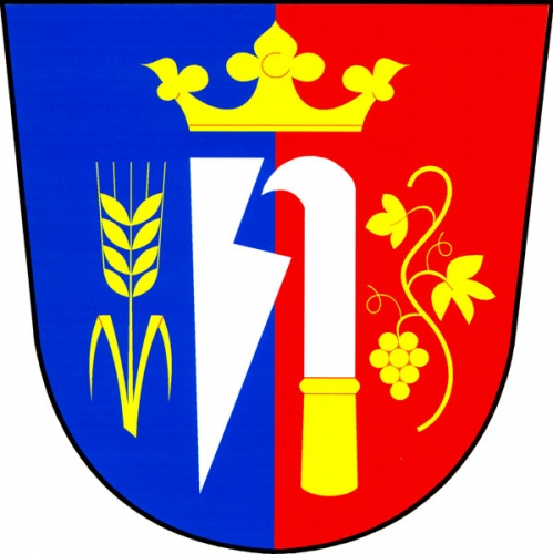 znak, Tasovice, okres Znojmo